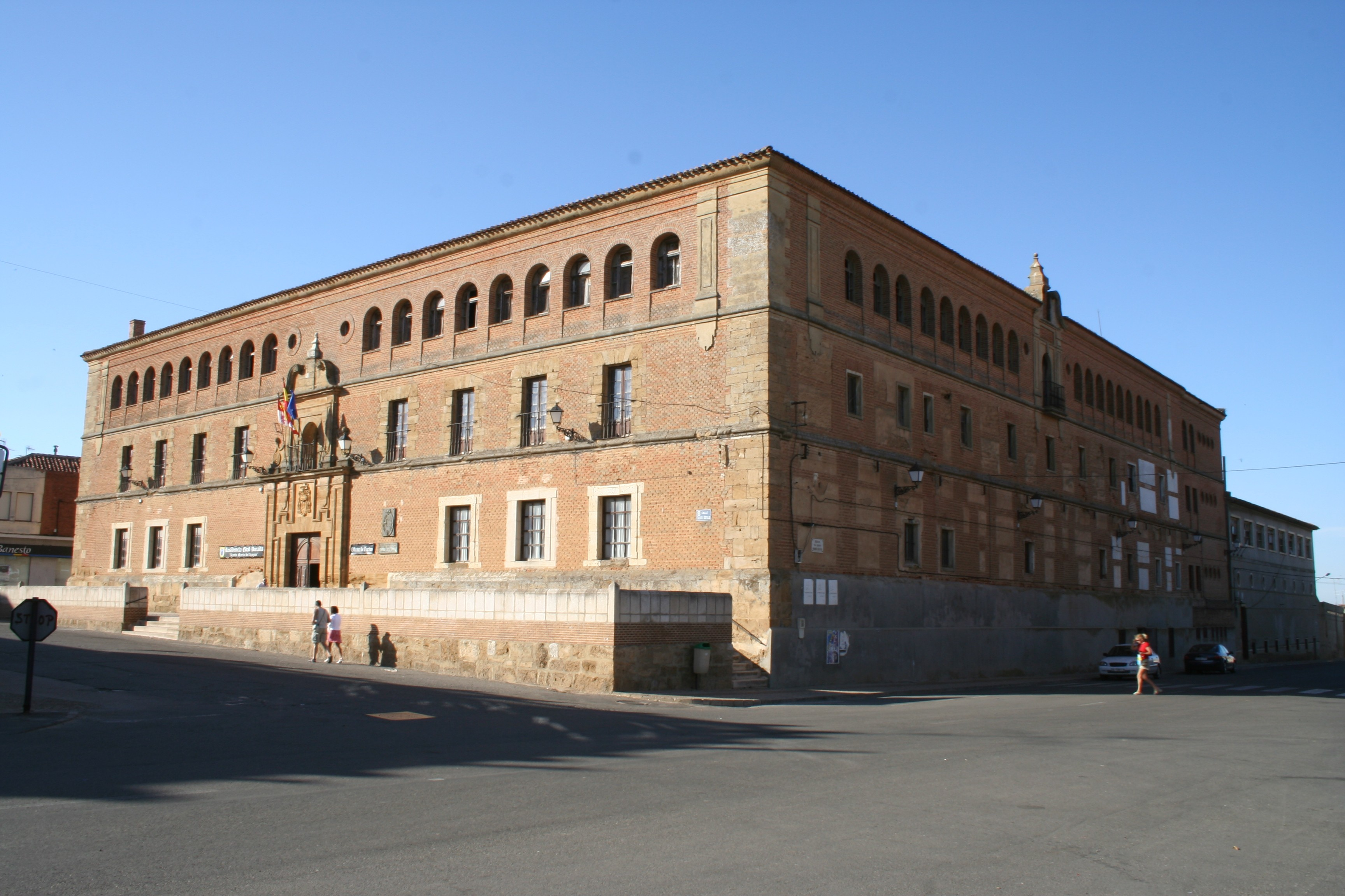 Antiguo seminario de Valderas